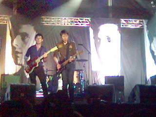 Concerto do grupo Franz Ferdinand em Lisboa, Portugal, em Setembro de 2005 Fonte - Próprio autor